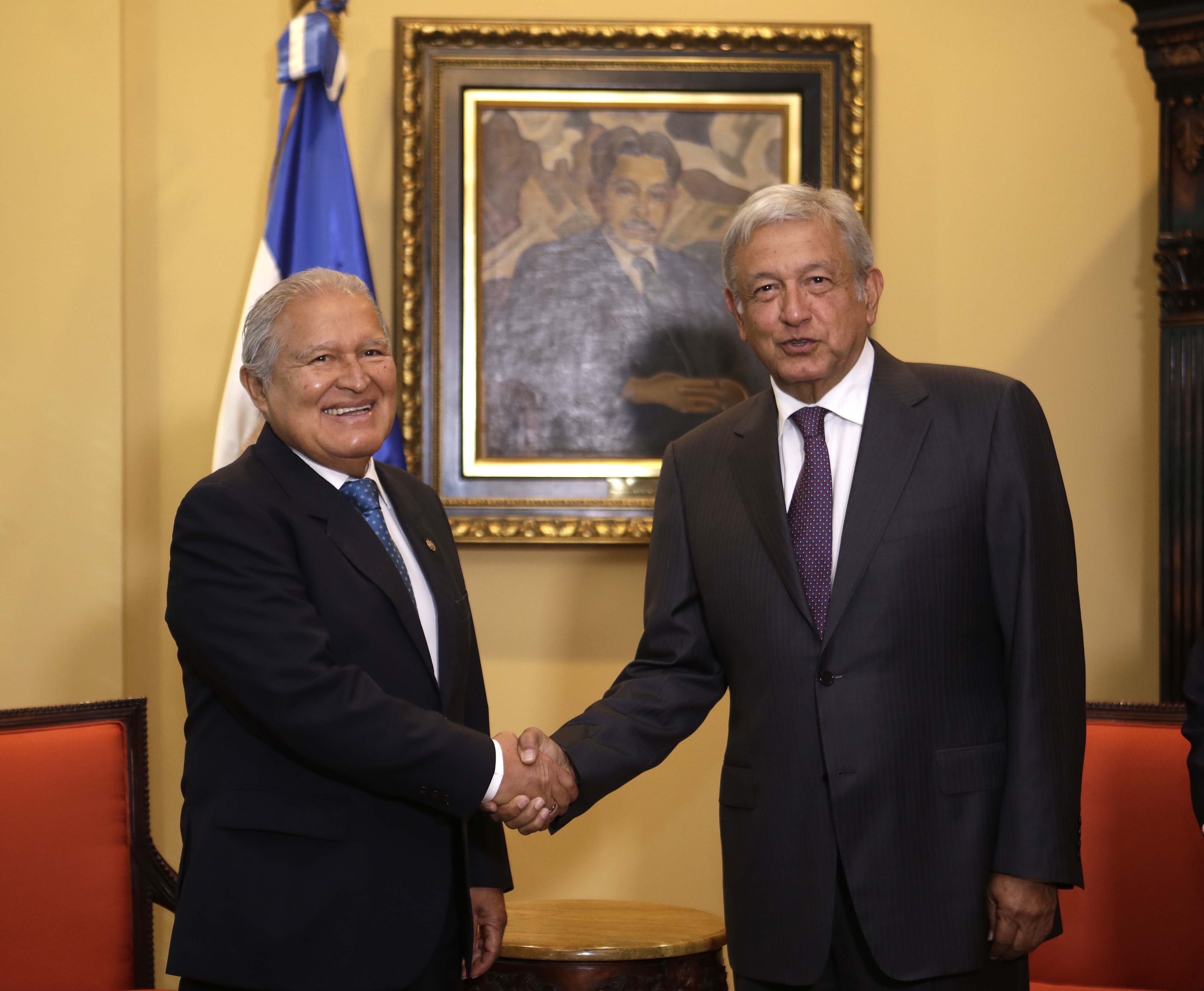 Reunión con Andrés Manuel López Obrador